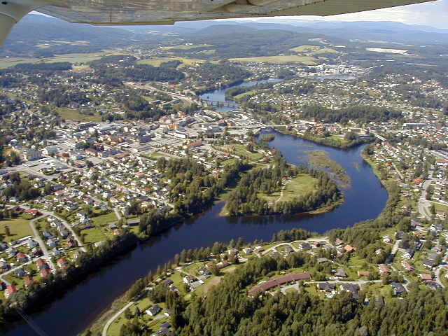 Hønefoss